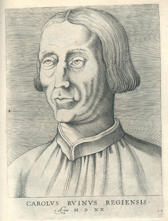 Carlo Ruini (1456-1530)